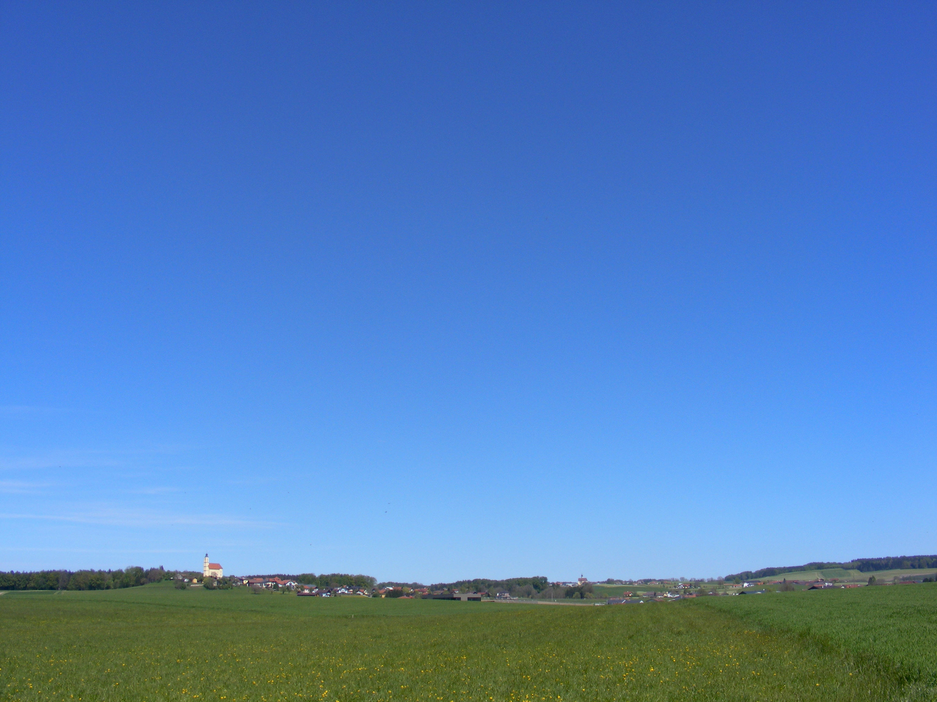 Moosdorf, Bezirk Braunau, Oberösterreich - Blick von Süden